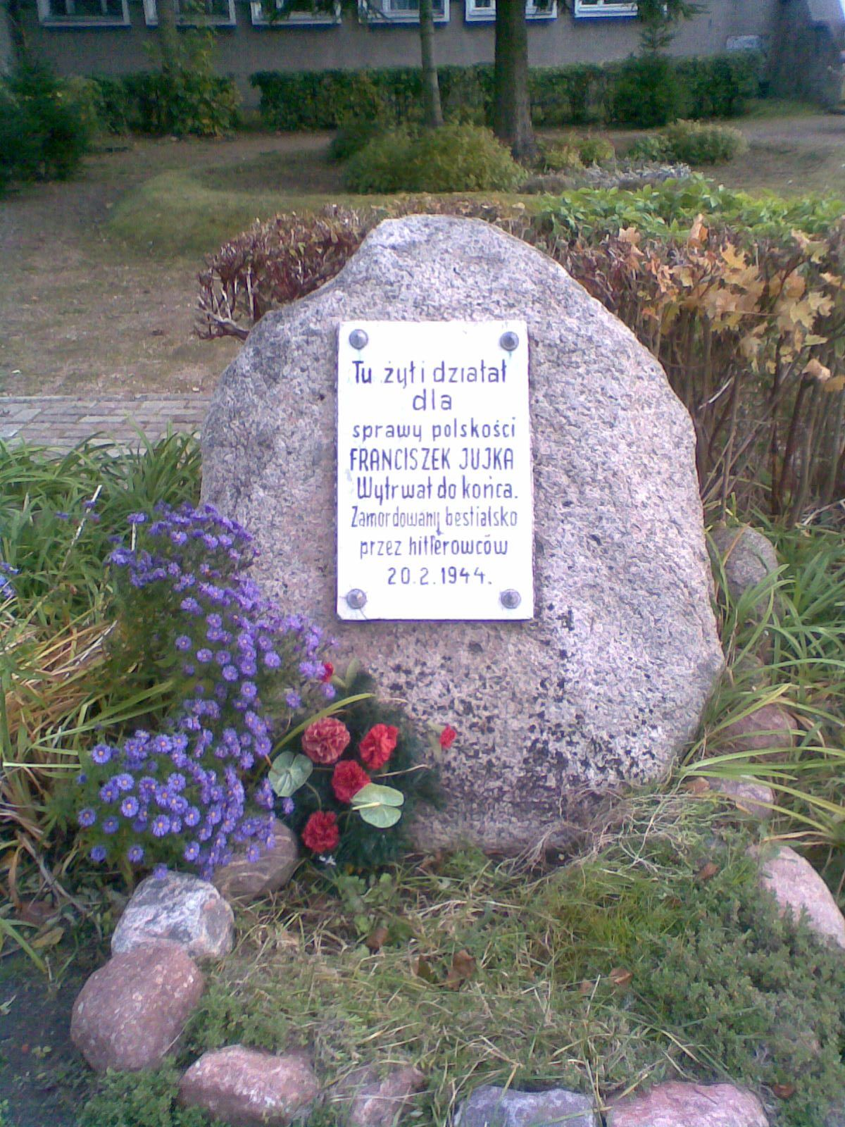 Kamień upamiętniający Franciszka Jujkę przy Zespole Szkół w Starym Targu